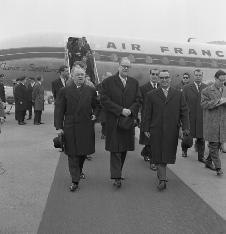 Besuch des schwedischen Ministerpräsidenten, Tage Erlander, Ankunft: München/Riem